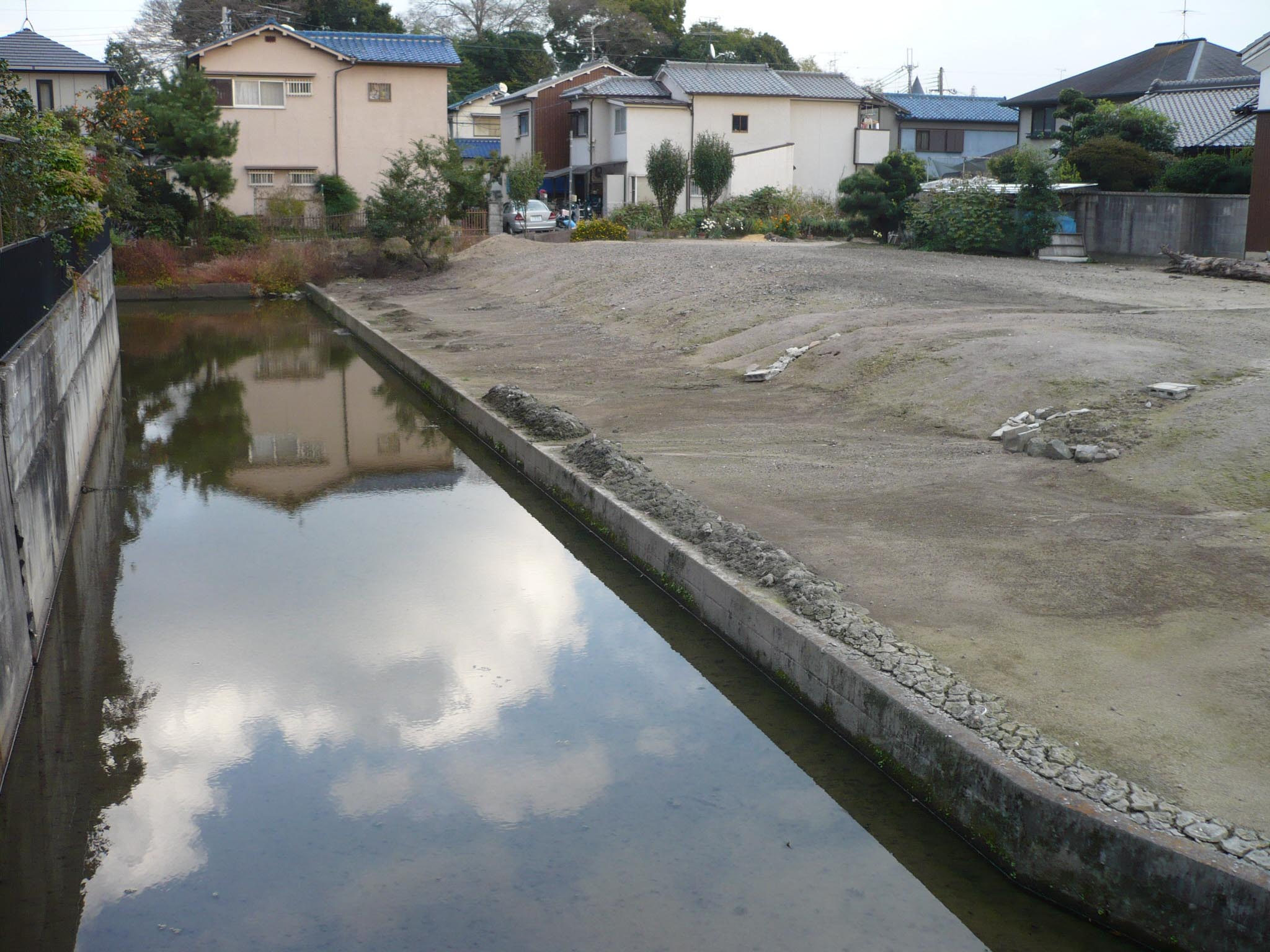 筒井城の堀跡